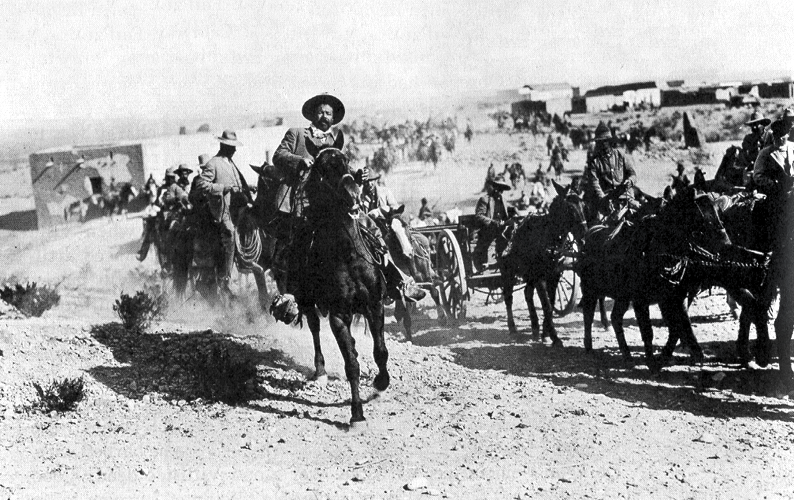 Francisco Villa auf seinem Hengst Siete Leguas vor seiner División del Norte, nördlich von Ojinaga, Chihuahua